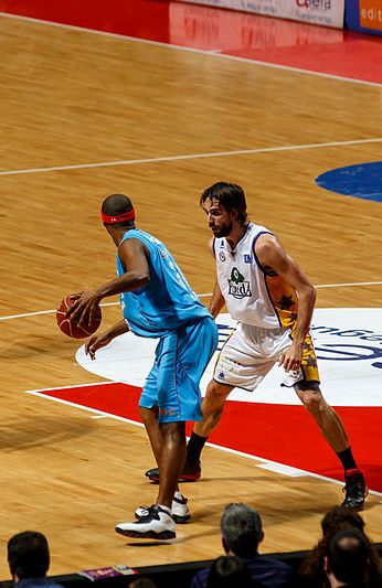 Jordi Grimau y Kirksay